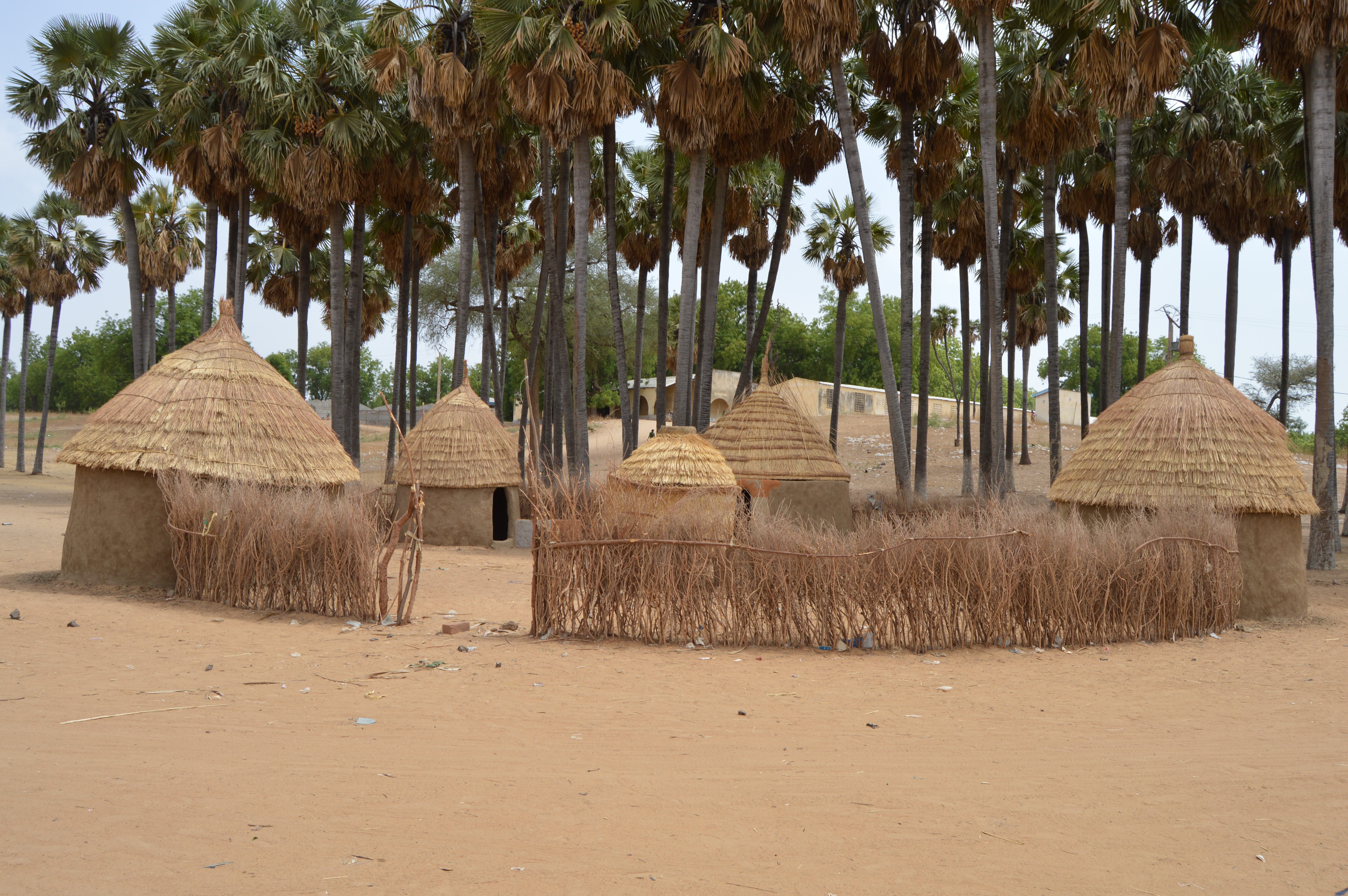 Village de Case obus construit pour le festival Massa Yagoua